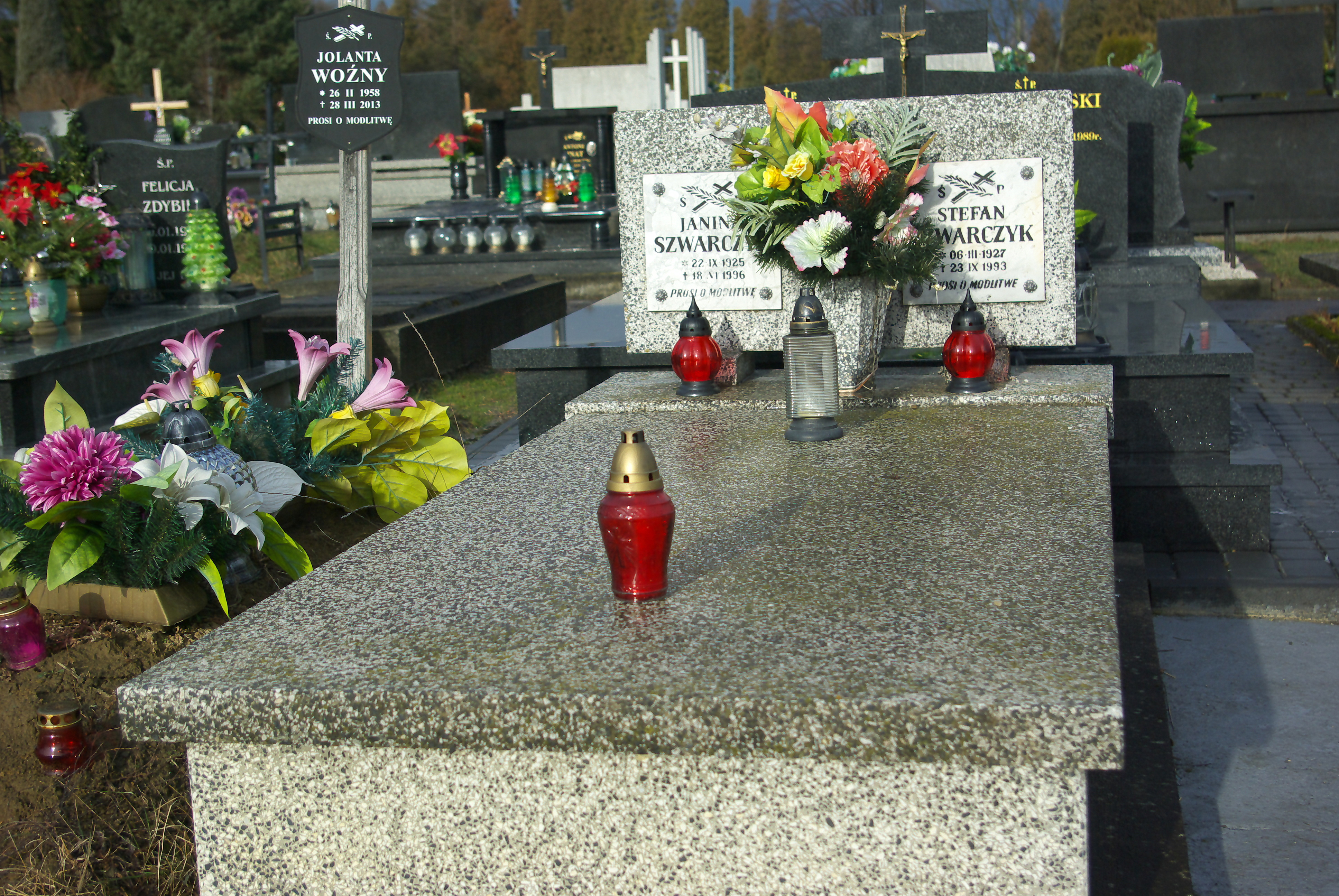 Grobowiec Janiny i Stefana Szwarczyk w części „Matejki Stary” Cmentarza Centralnego w Sanoku.